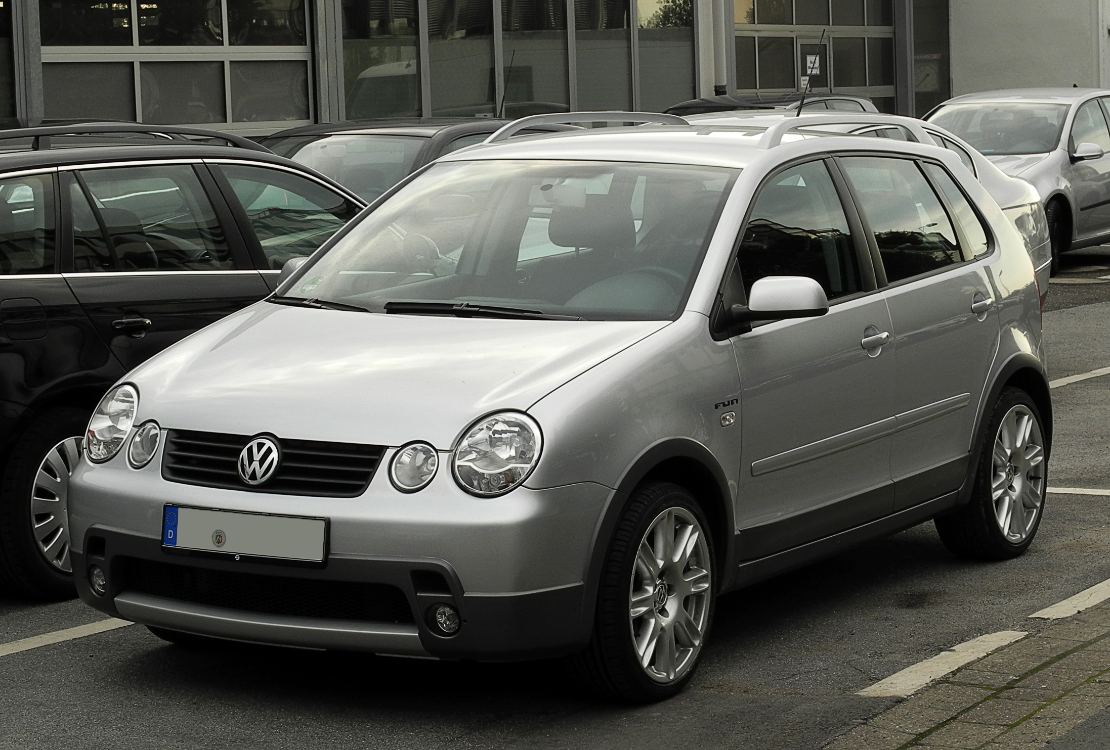 VW Polo Fun (IV)